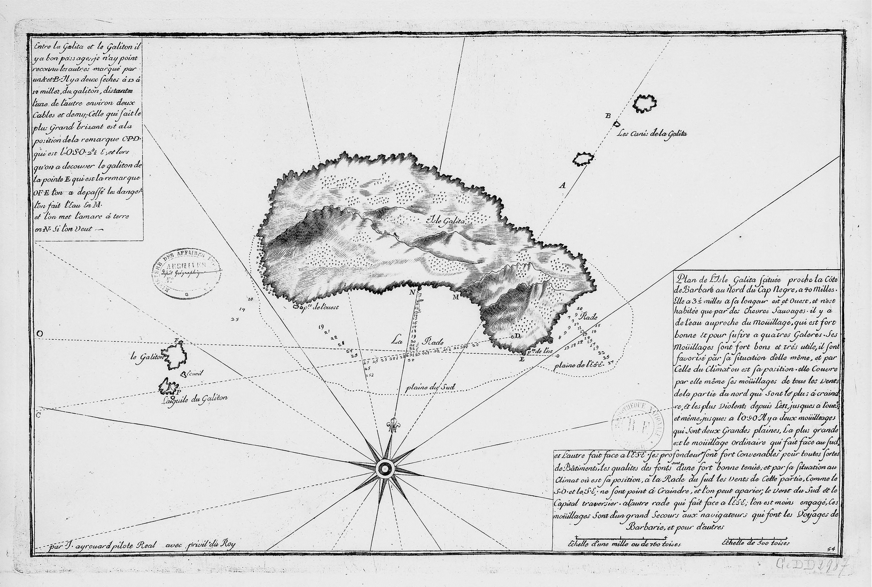 "Plan de l'Isle Galita scituée proche la côte de Barbarie au nord du cap Negre": Plan de l'île de Galite, Tunisie